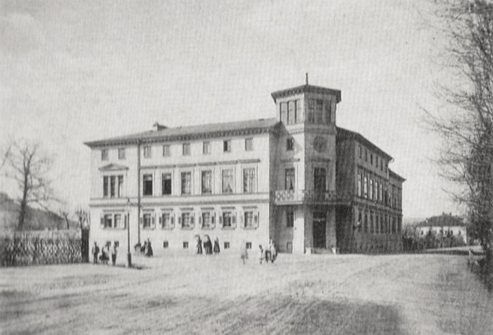 Das Gebäude der Mitteldeutschen Creditbank in Meiningen, ab 1905 Bank für Thüringen, 1909 abgebrochen.